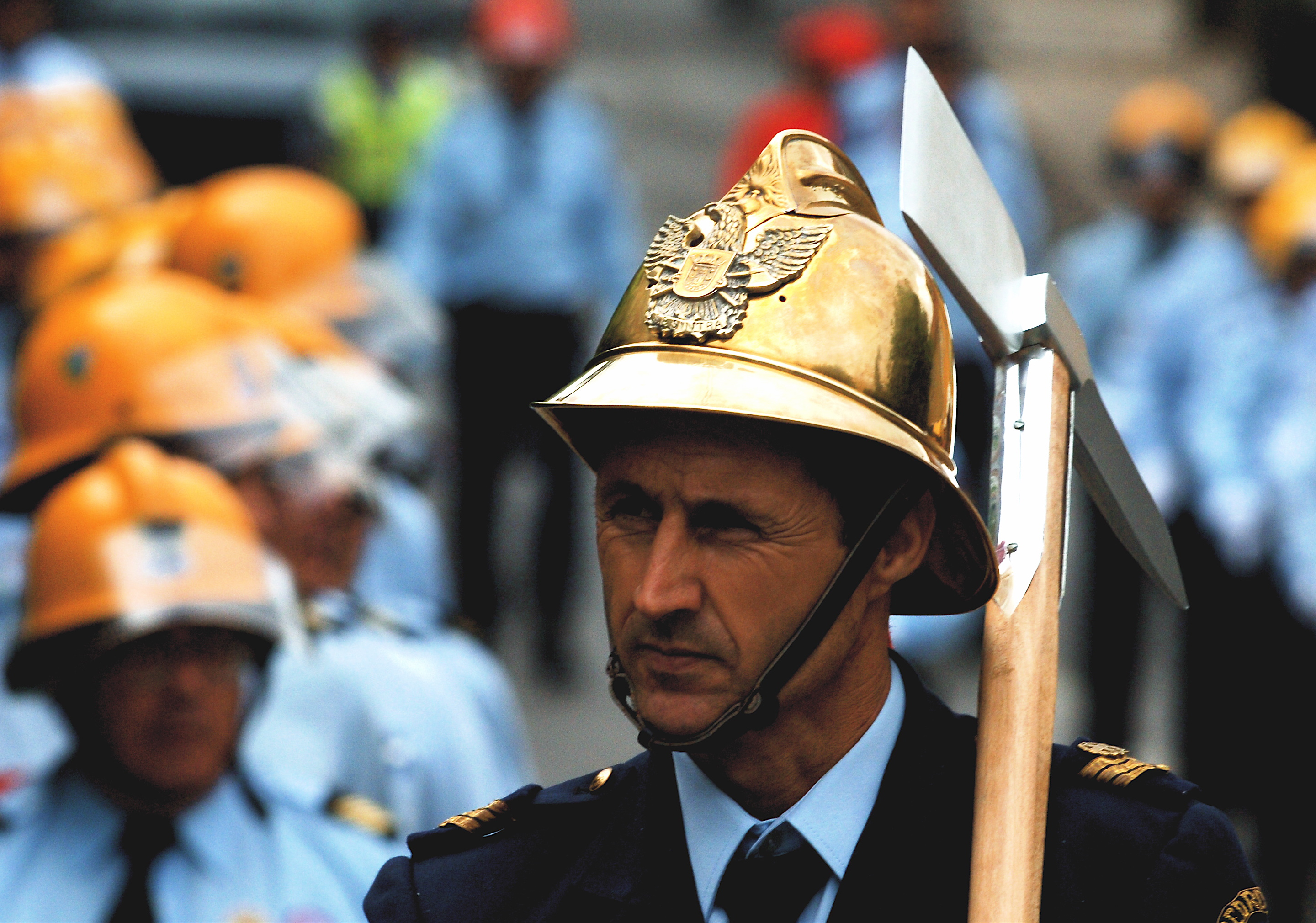 Bombeiro em São de Pedro de Sintra, Portugal.